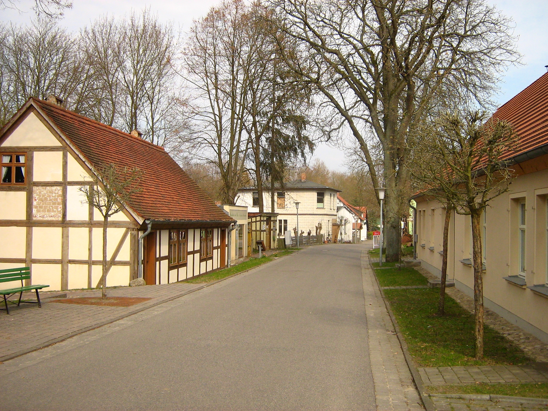 Dorfstraße in Neuglobsow (Gemeinde Stechlin,Landkreis Oberhavel, Brandenburg).